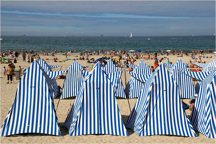 les fameuses tentes de la plage de Dinard